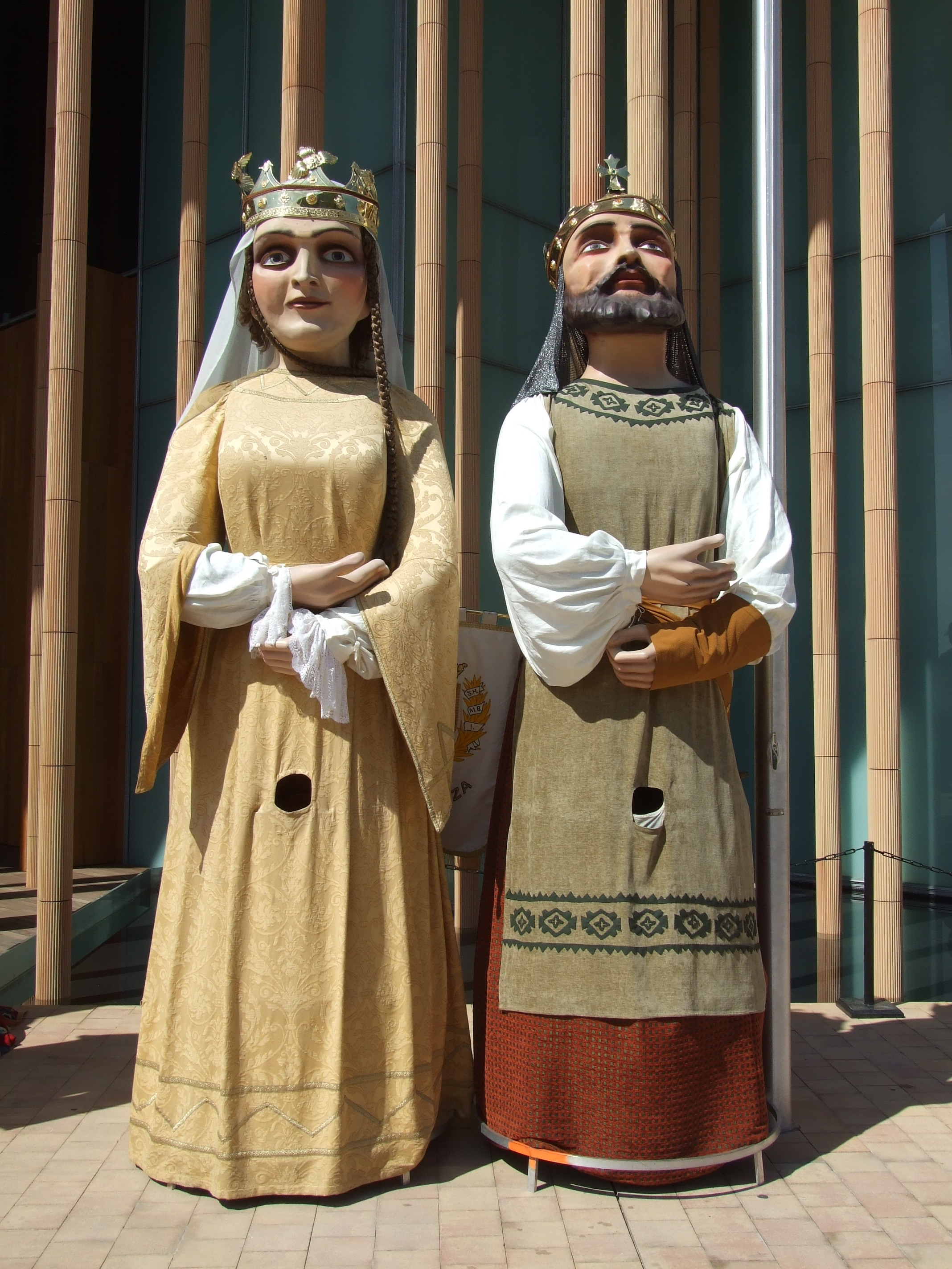 Gigantes de Zaragoza.